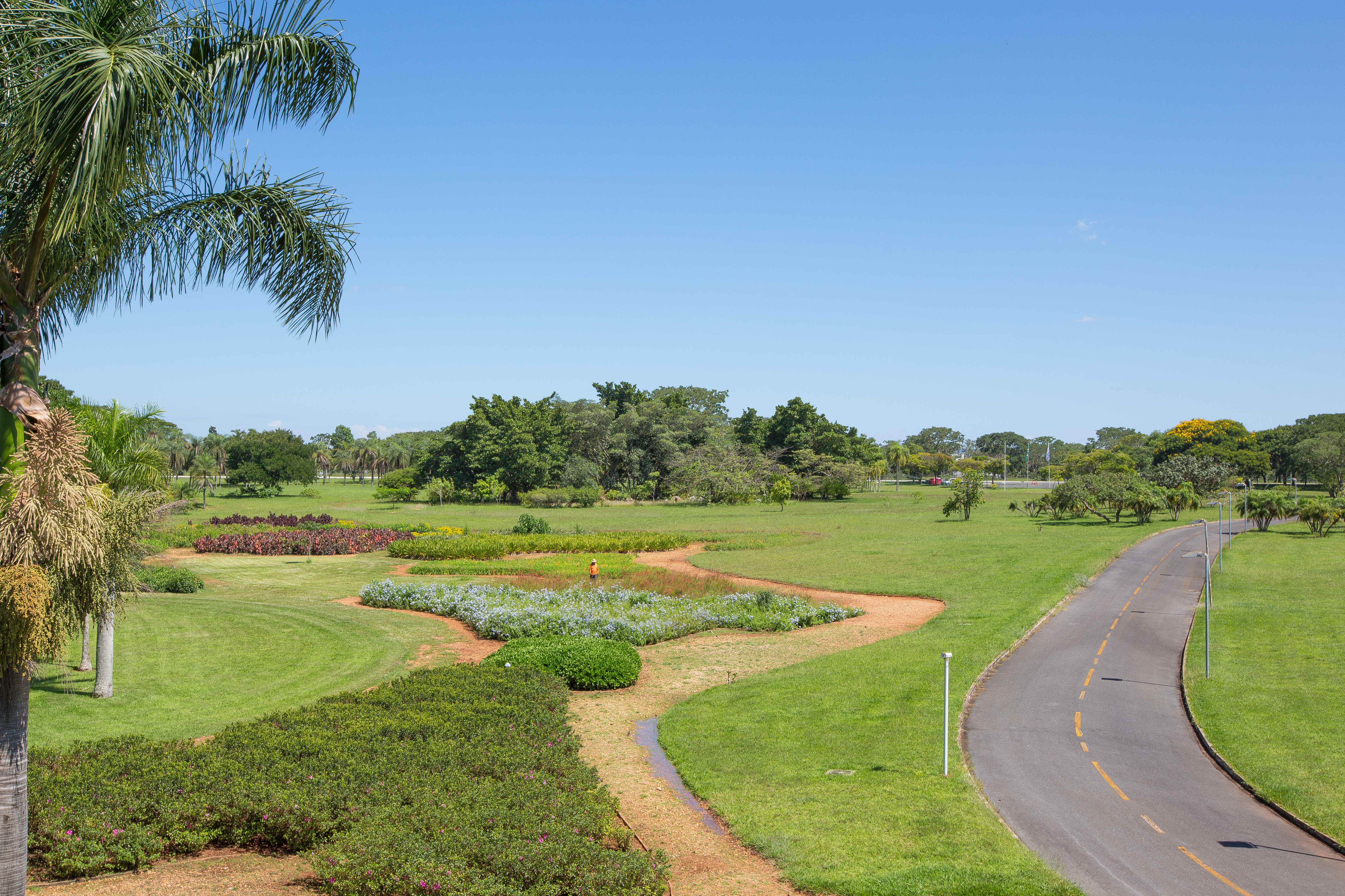 2014 - Palácio do Jaburu Fotos: Anderson Riedel